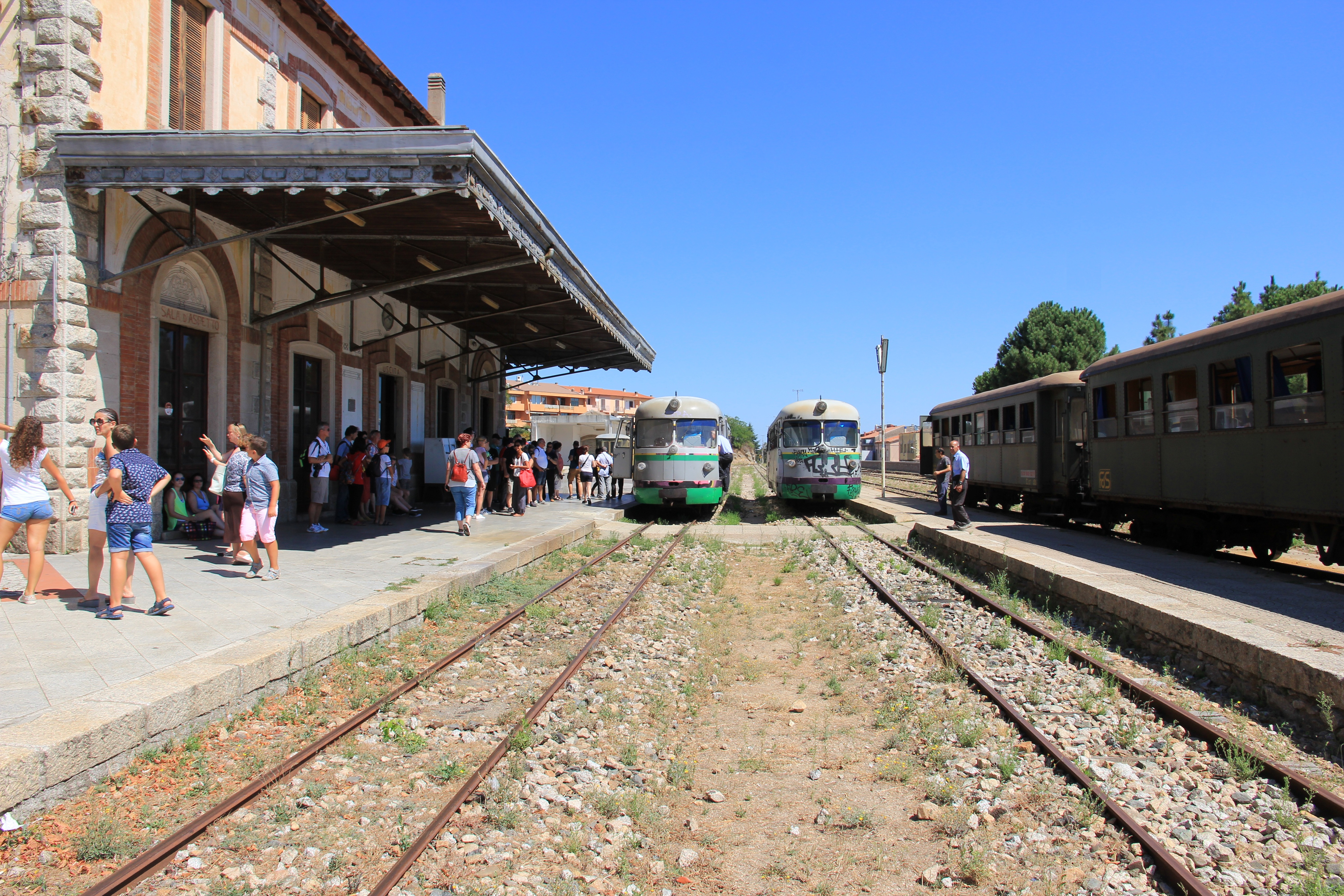 Tempio Pausania - Stazione ferroviaria